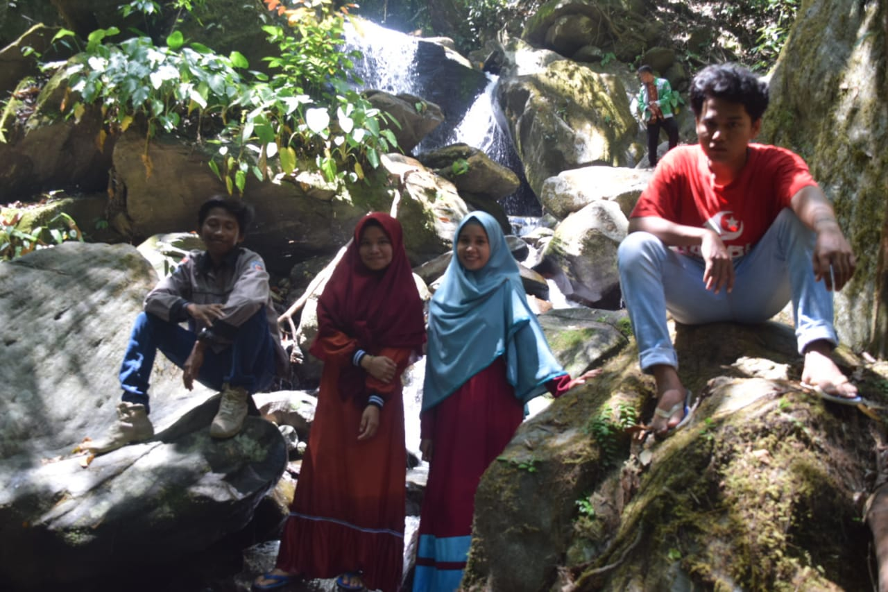 Foto di permandian air terjun desa ulu mowewe.